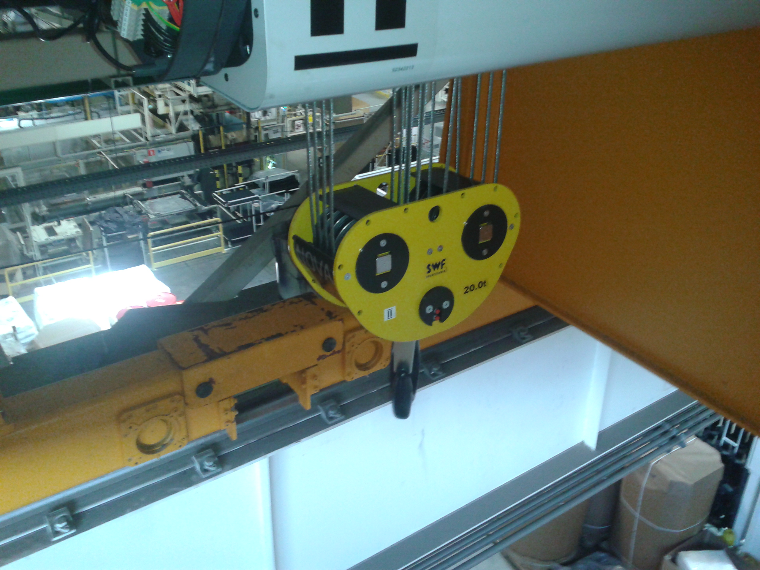 kavelj na vitlu za dvigovanje bremena.